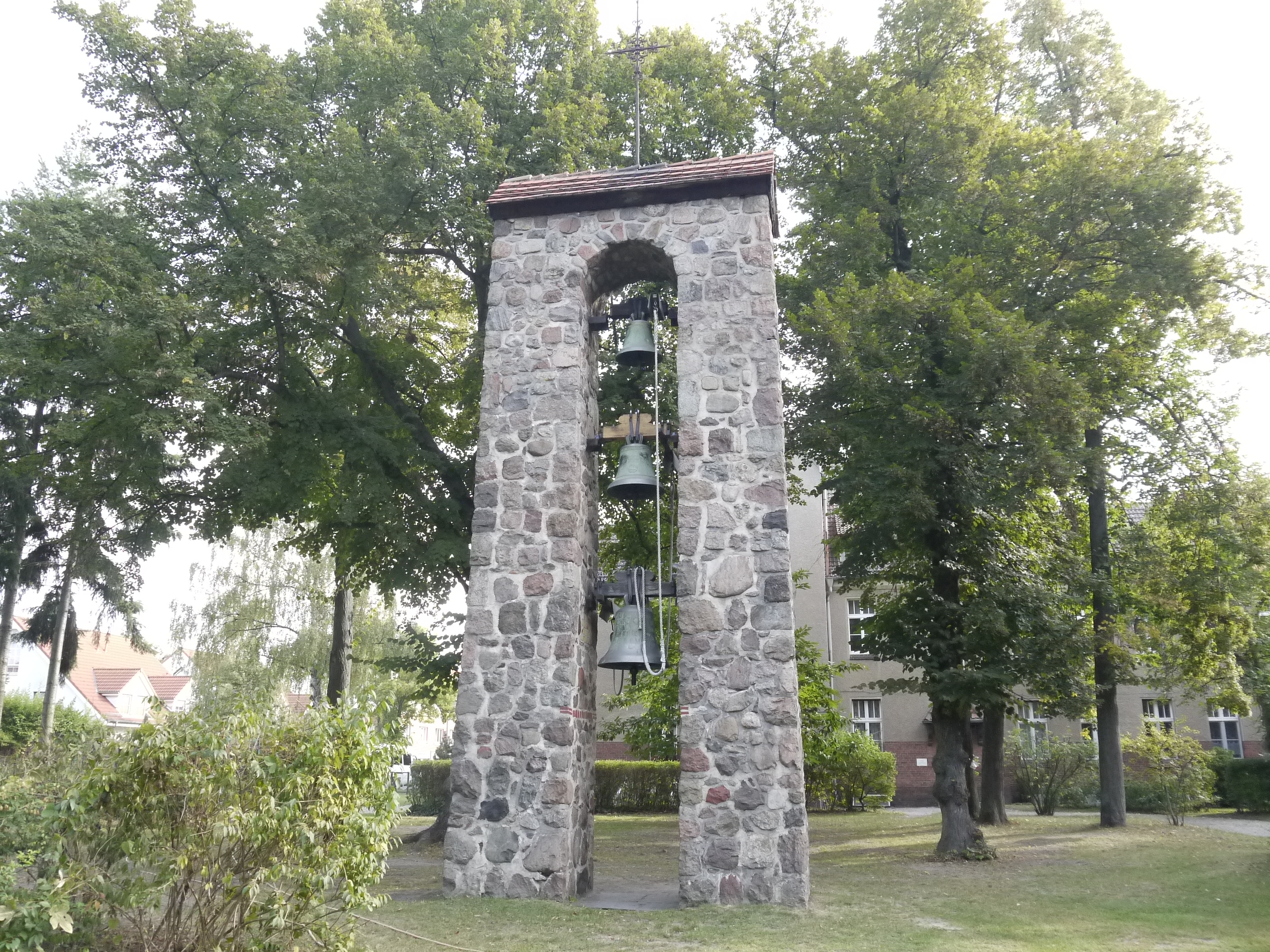 Die Glocken des Gemeindehauses in Berlin-Nordend, nach Jochwechsel der Glocke 2.